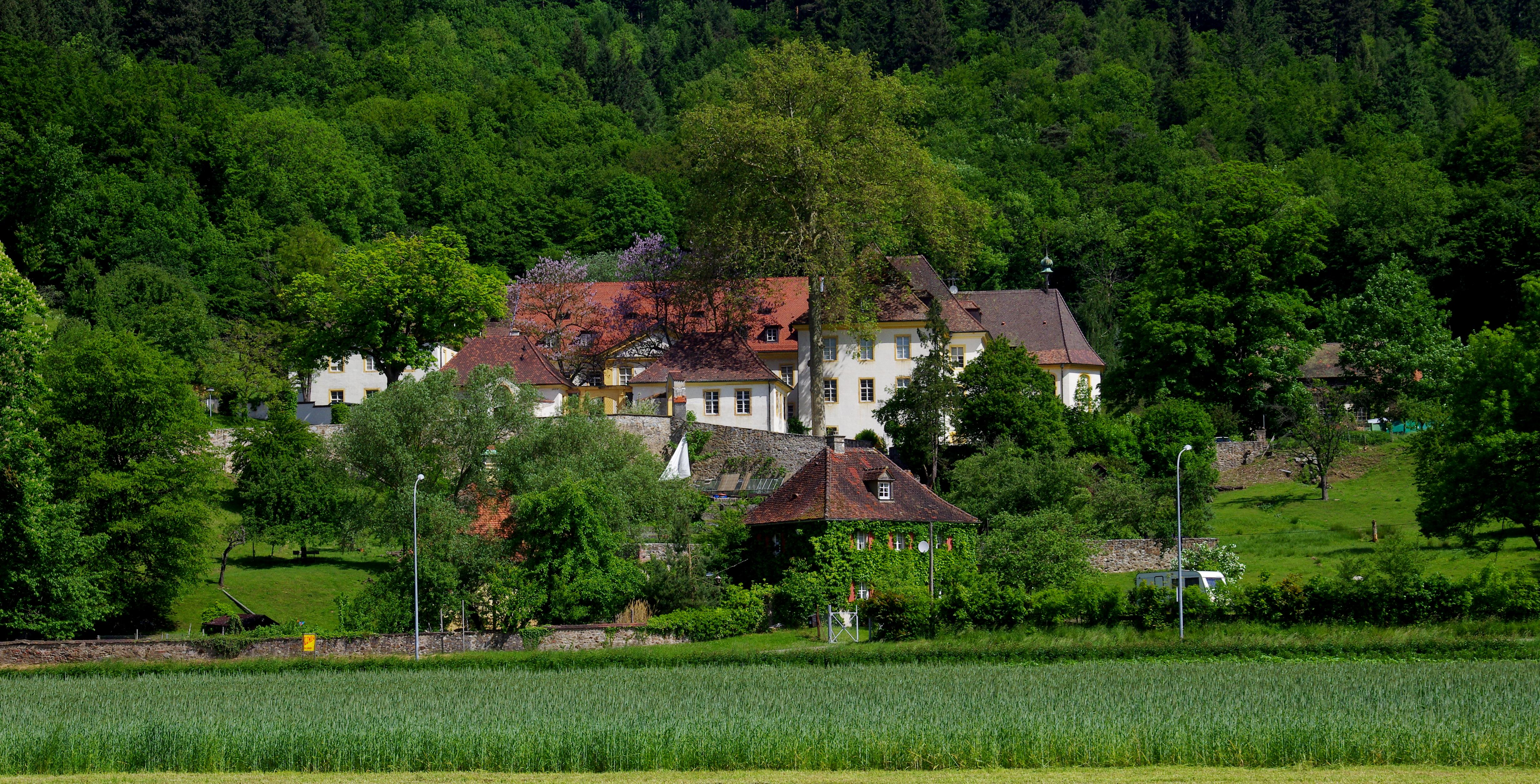 Blick auf die Freiburger Kartause von der Dreisam aus